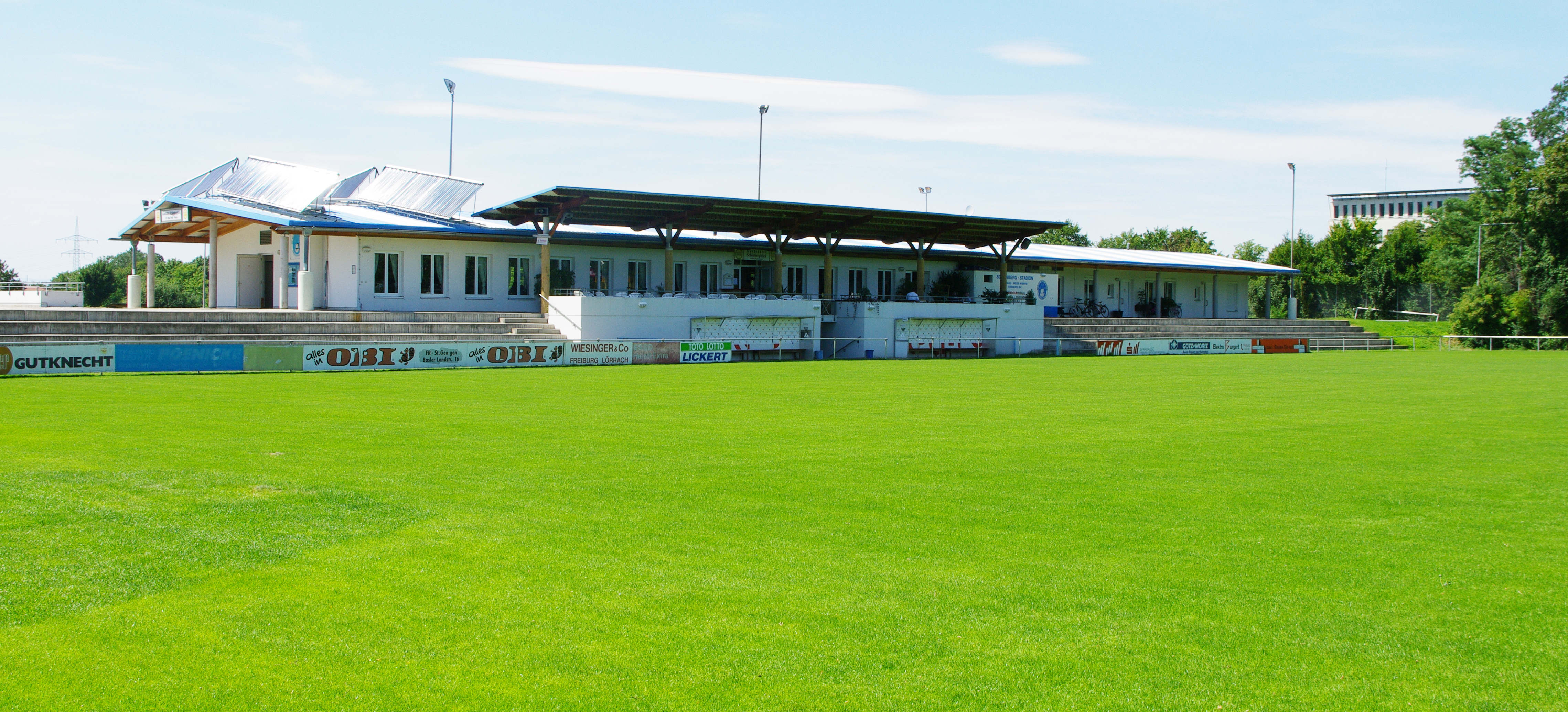 Das Schönbergstadion in Freiburg im Breisgau